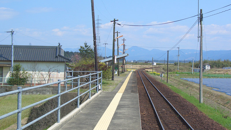 くま川鉄道湯前線ja:川村駅 ホーム 写真手前がja:人吉駅方面。 この写真の前の版には、走行中の車内から撮影したホームの画像があります。 撮影者/著者/著作権保有者 : MK Products (本人がアップロード) 撮影日 : 2007/03/14 川村駅用にアップロードした画像です。良い画像があれば別の画像に変えてください。